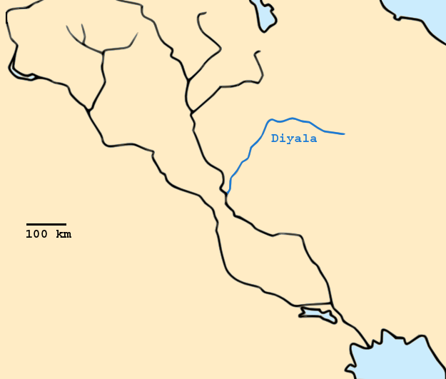 Der Fluss Diyala im Irak